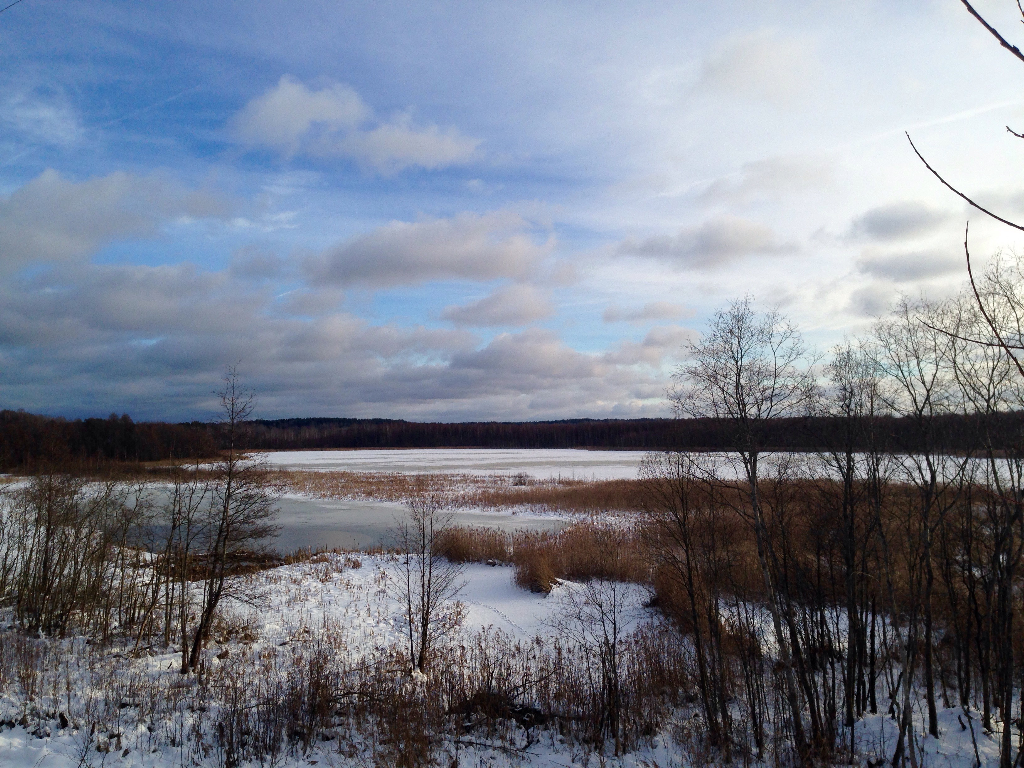 Себежский: Национальный парк граничит: на севере и востоке с Себежским лесничеством, на юге и юго-западе с Республикой Беларусь, на западе - с Латвийской Республикой. Протяженность с севера на юг -28 км, с запада на восток -34 км. Географические координаты его центра: 56057мин. с.ш., 28005мин. в.д, Себежский район, Псковская область This image is related to the protected area of Russia number 6000355